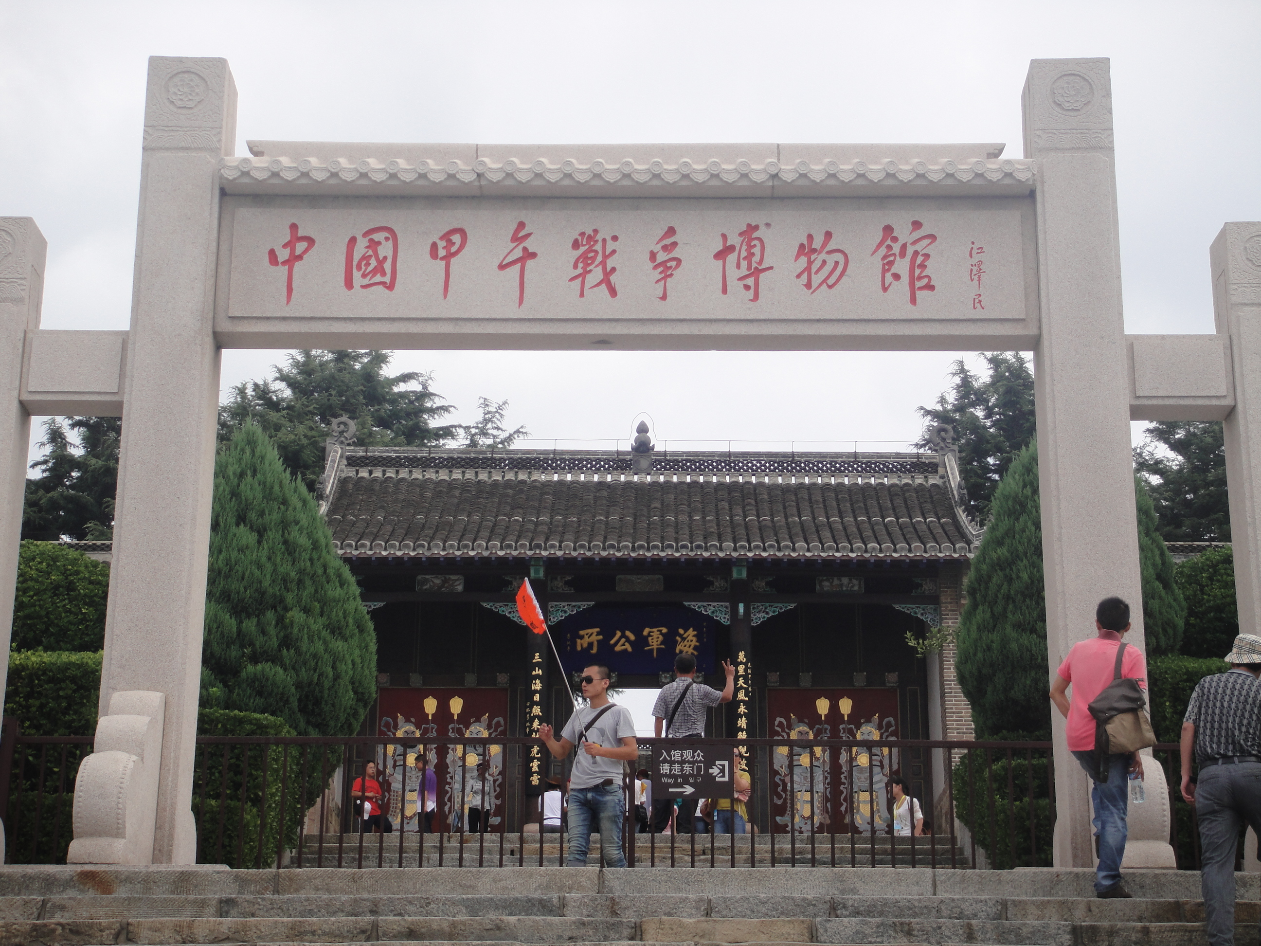 江泽民题字“中国甲午战争博物馆”